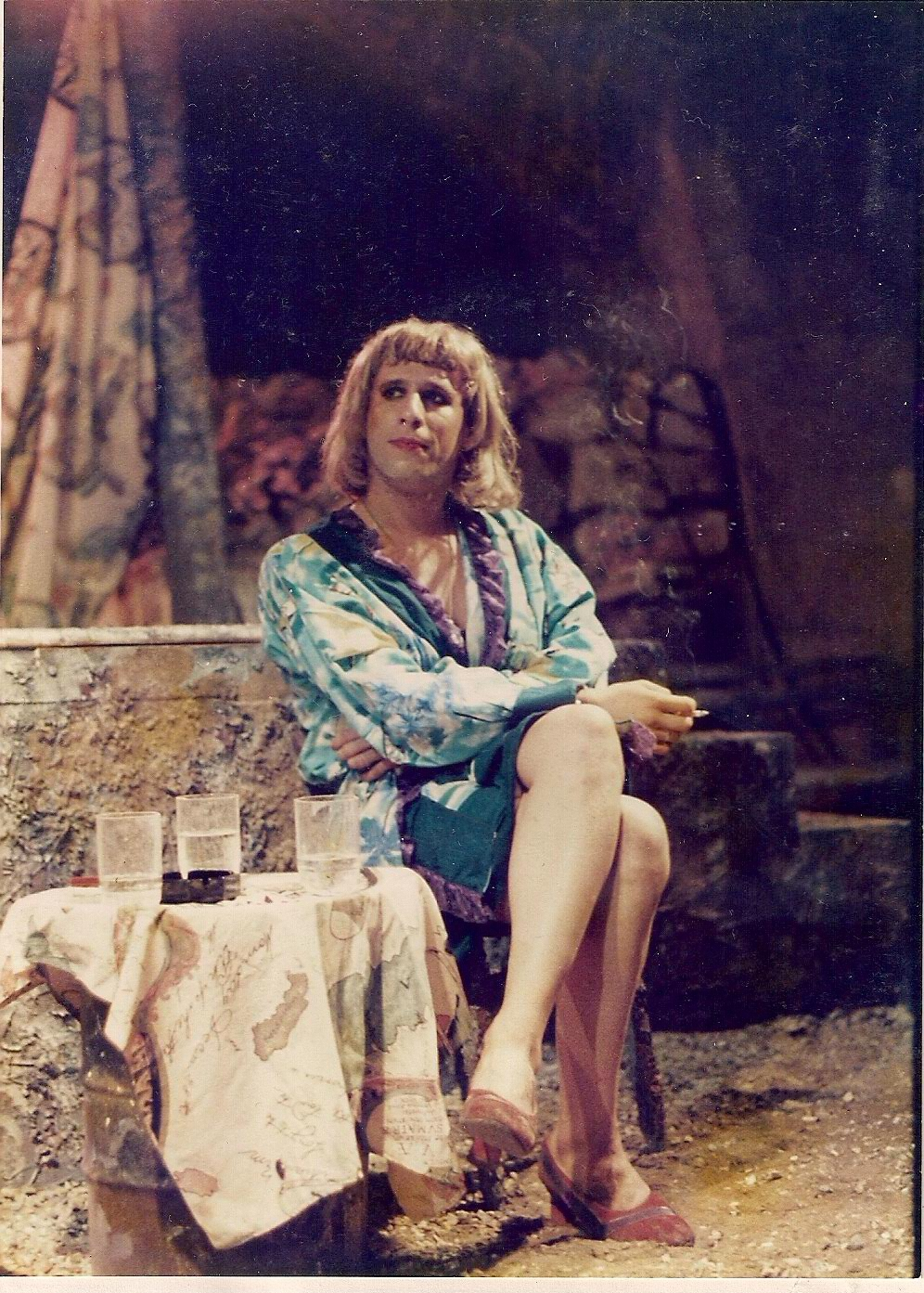 גיל אלון בתפקיד מלכה בהצגה "חי"